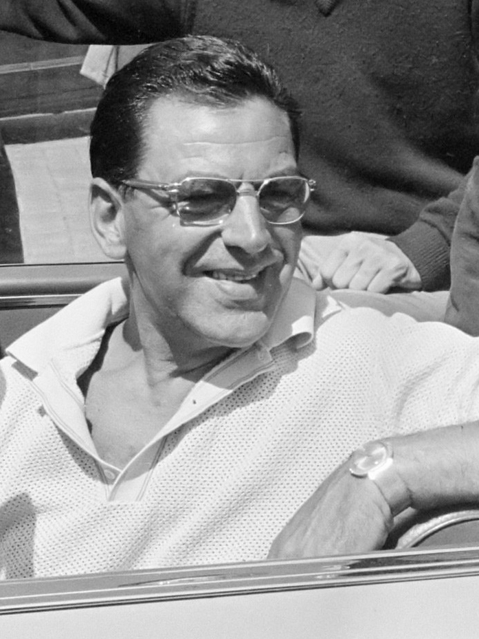 Songfestival te Knokke; de Nederlandse ploeg met Lou van Rees 9 juli 1966